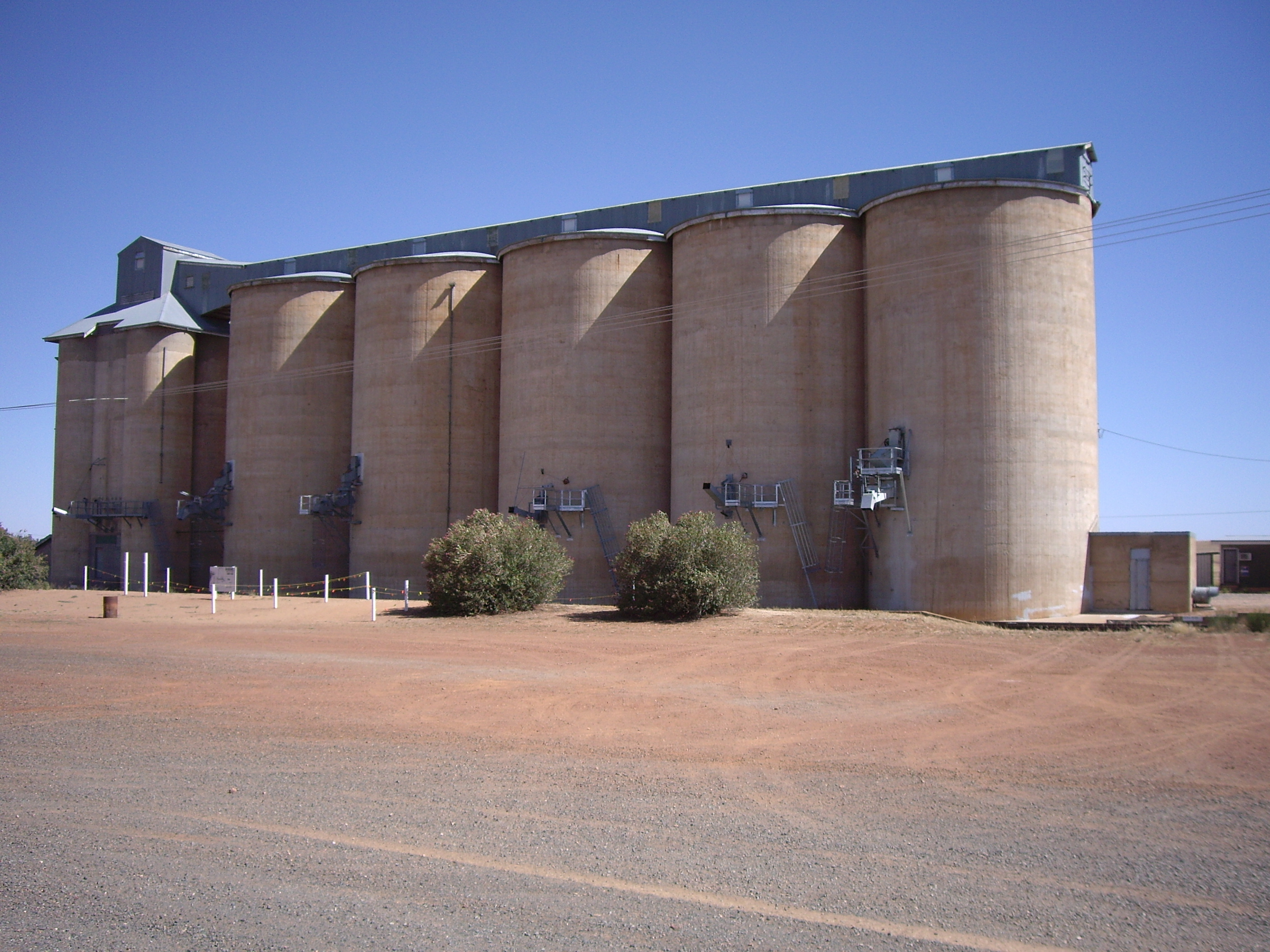 Silos at Mirrool